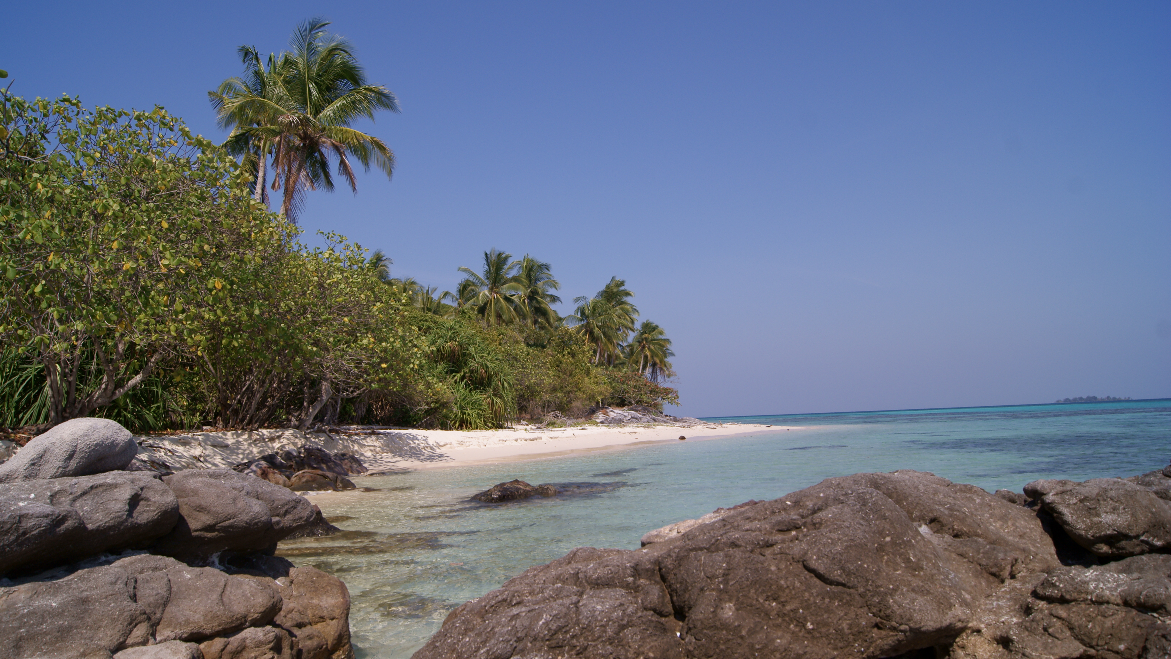 Pantai Tanjung Gelam (Ujung Gelam), Karimun Jawa